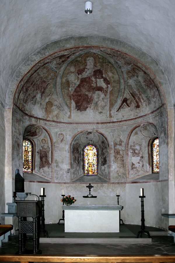 Altarraum mit Deckenmalerei